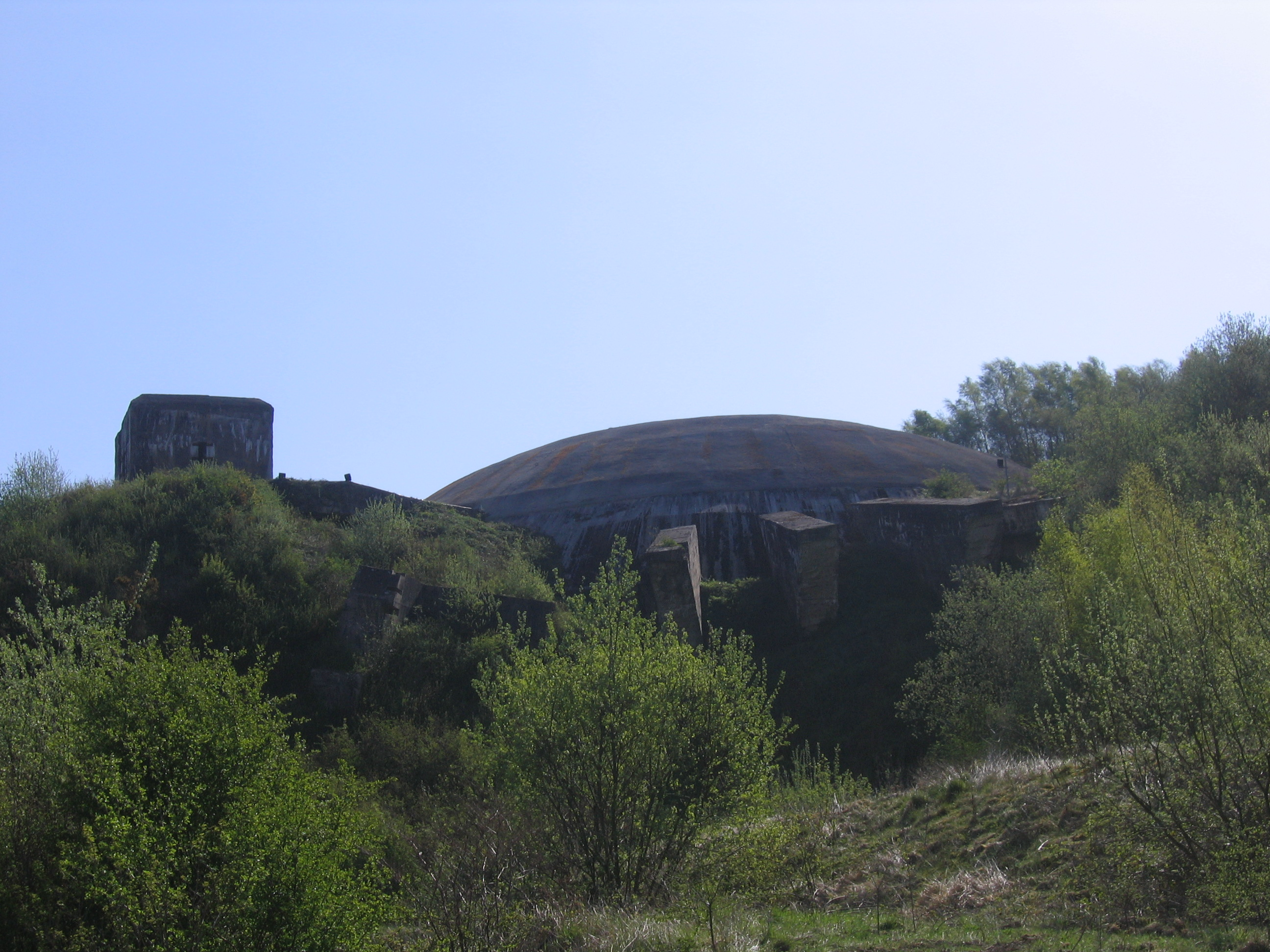 La Coupole d'Helfaut photographiée à proximité de l'entrée du musée prenant place dans cette même structure.